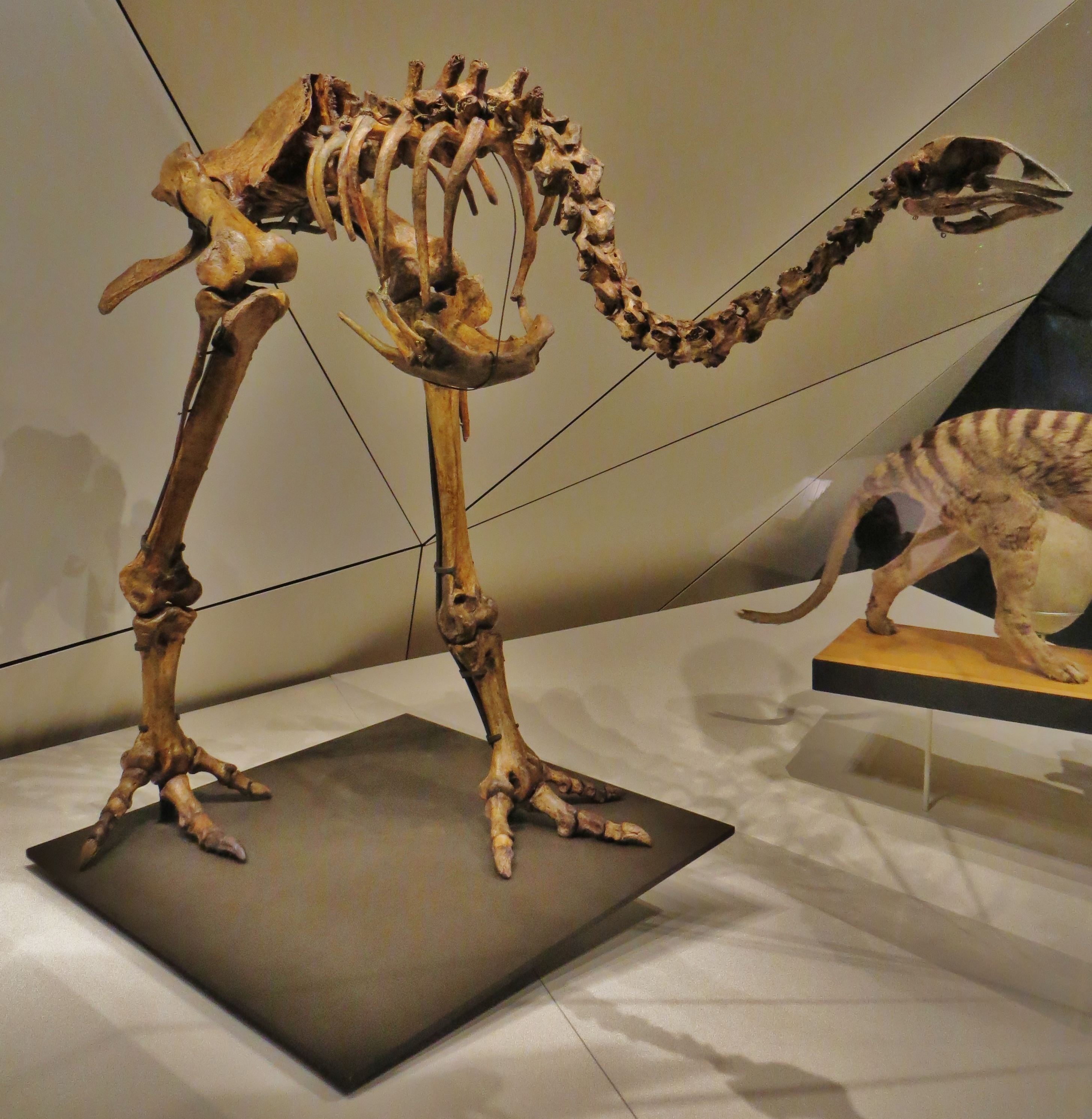 Fossil - Took the picture at Musee des Confluences, Lyon